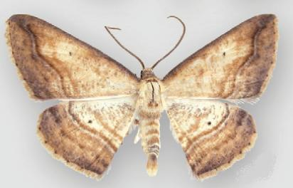 Campatonema lineata male